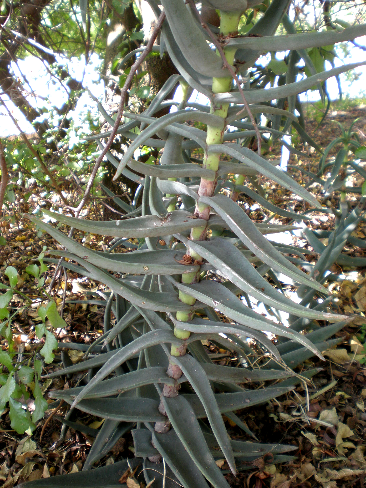 Jardín Botánico de Barcelona.